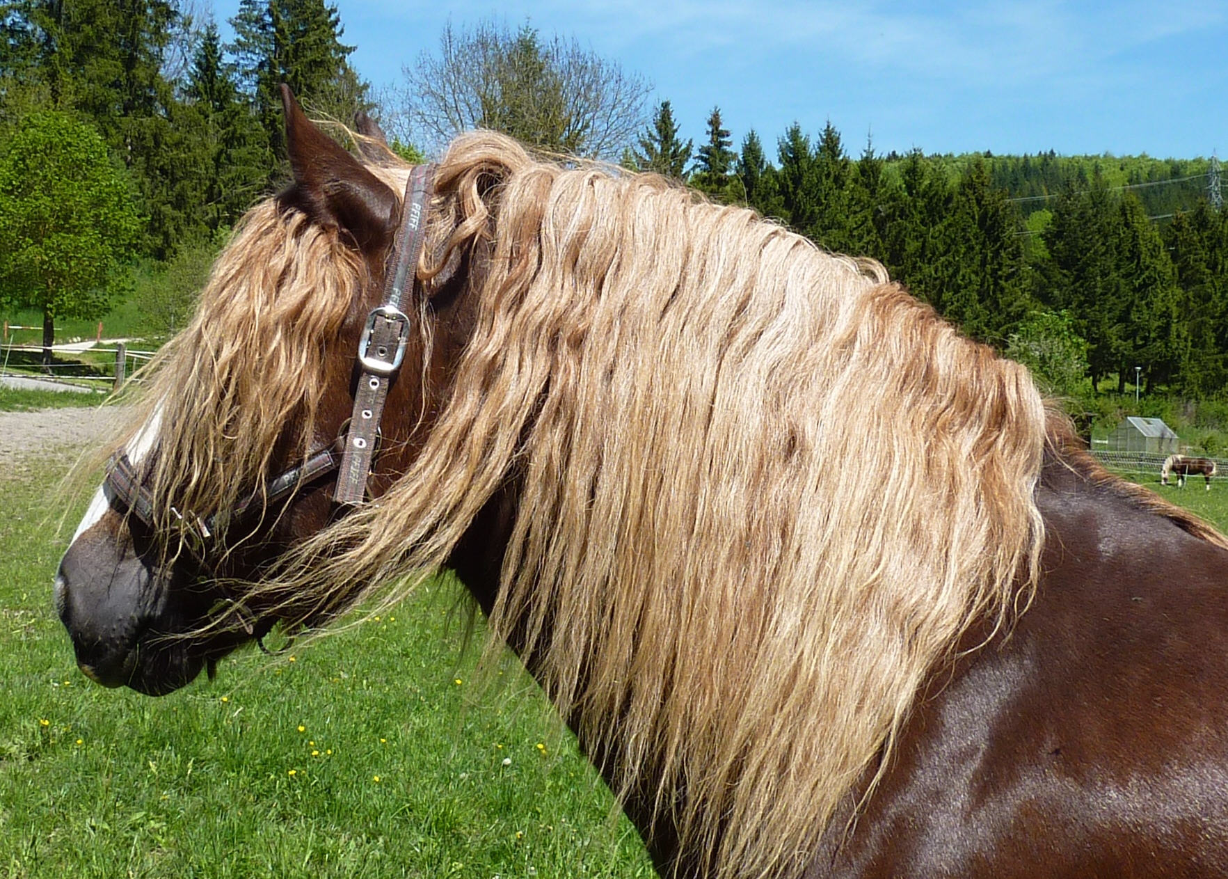 Schwarzwälder Kaltblut